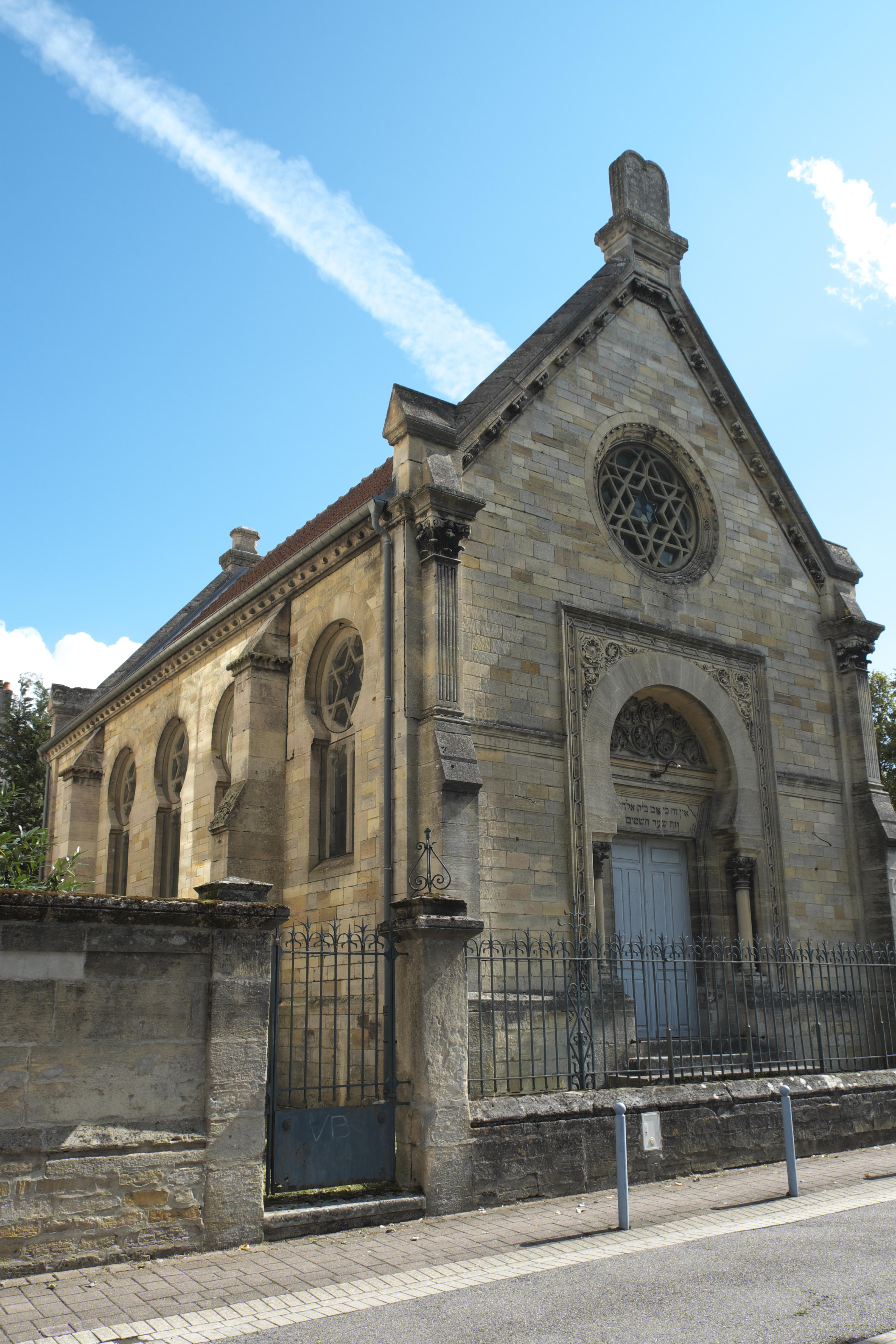 Synagoge in Bar-le-Duc im Département Meuse (Lothringen/Frankreich) .